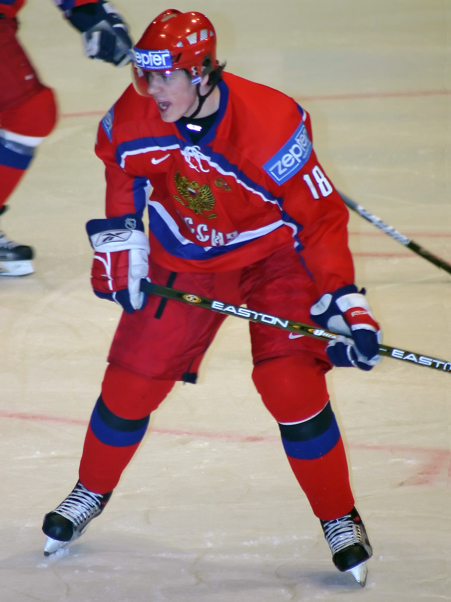 Evgeni MALKIN - Russia